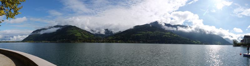 Panorama des Zeller See in Österreich.